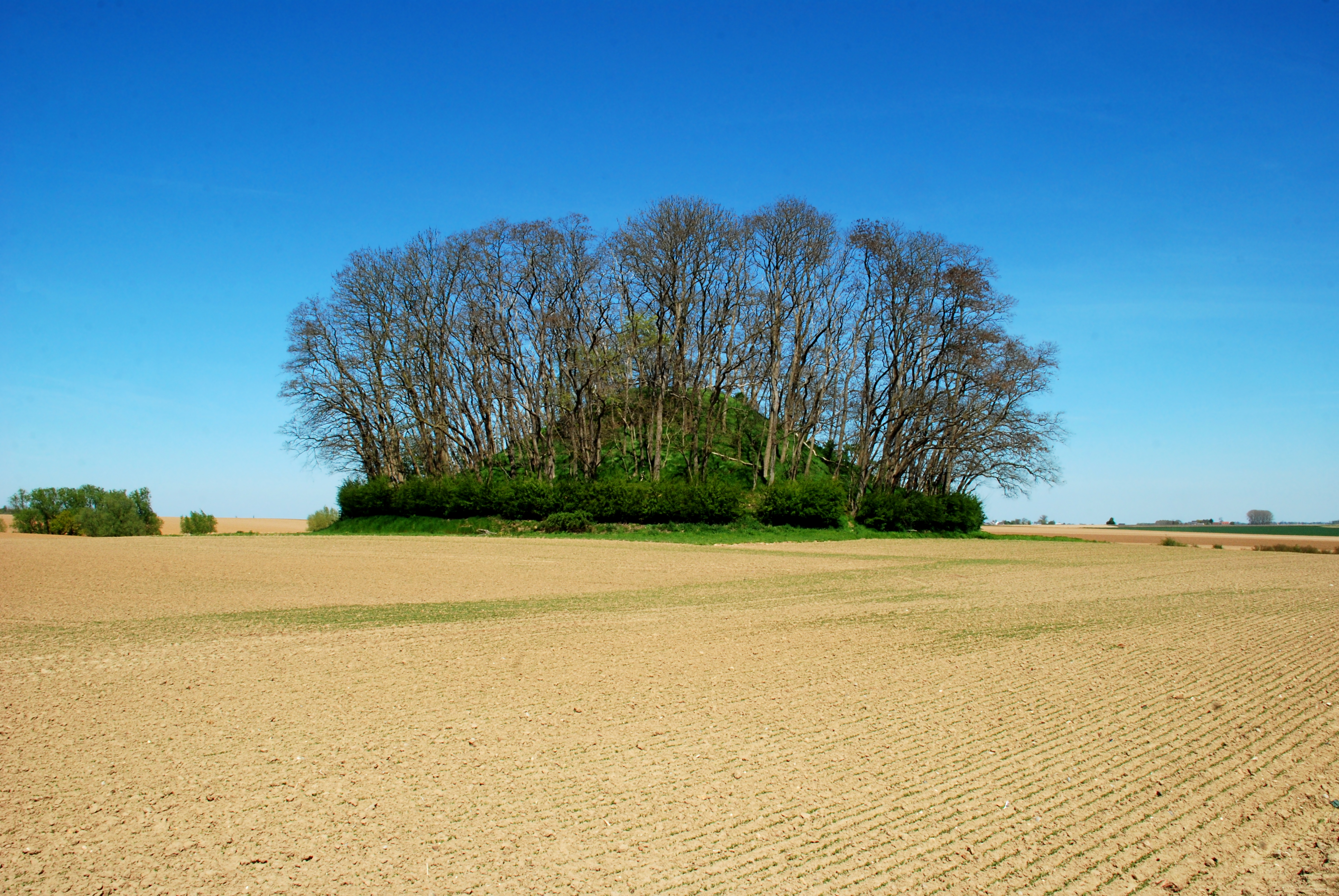 Belgique - Brabant wallon - Ramillies - Grand-Rosière-Hottomont - Tumulus d'Hottomont